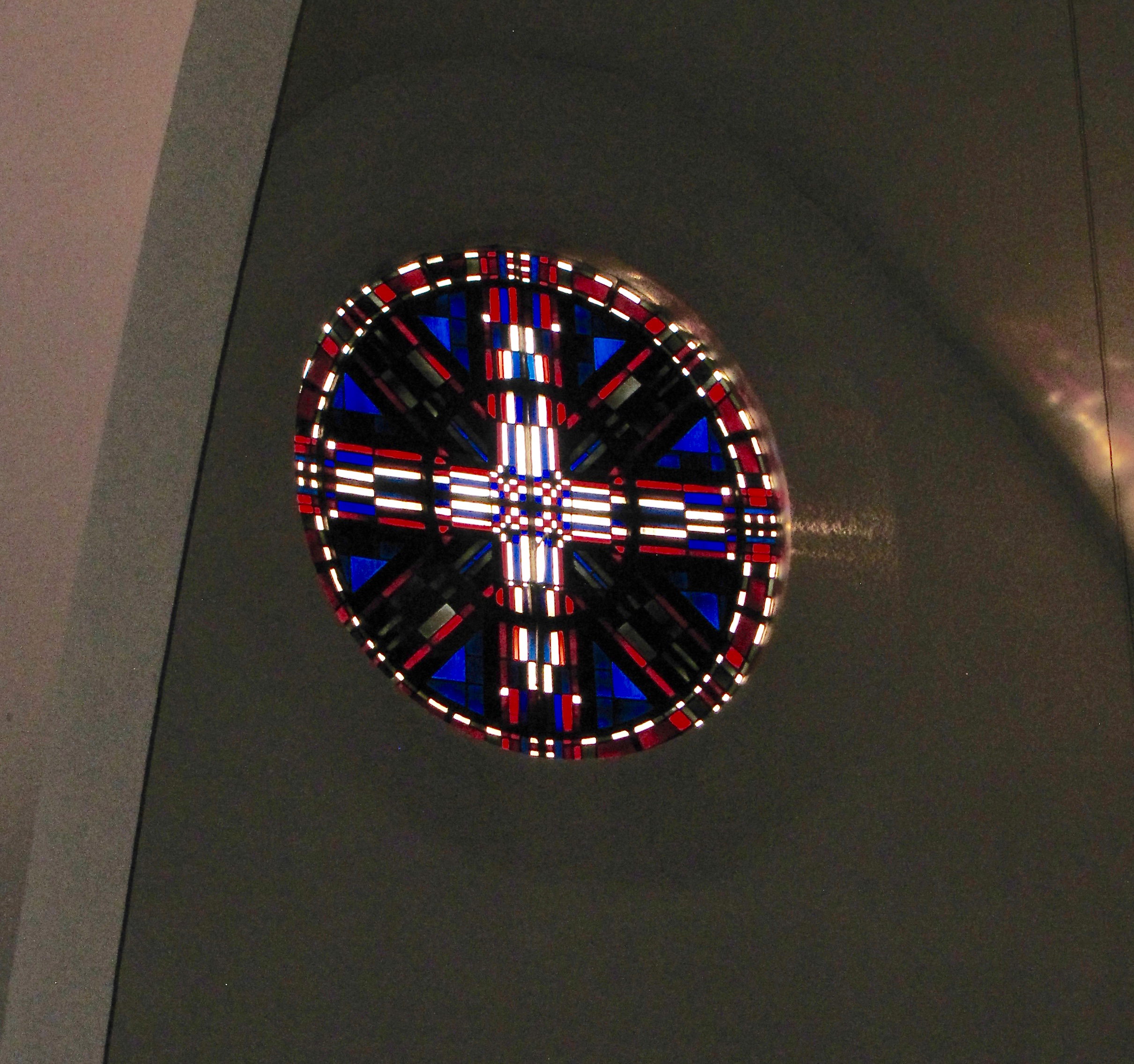 St. Engelbert (Köln-Riehl): Glasfenster von Anton Wendling (1953-55)